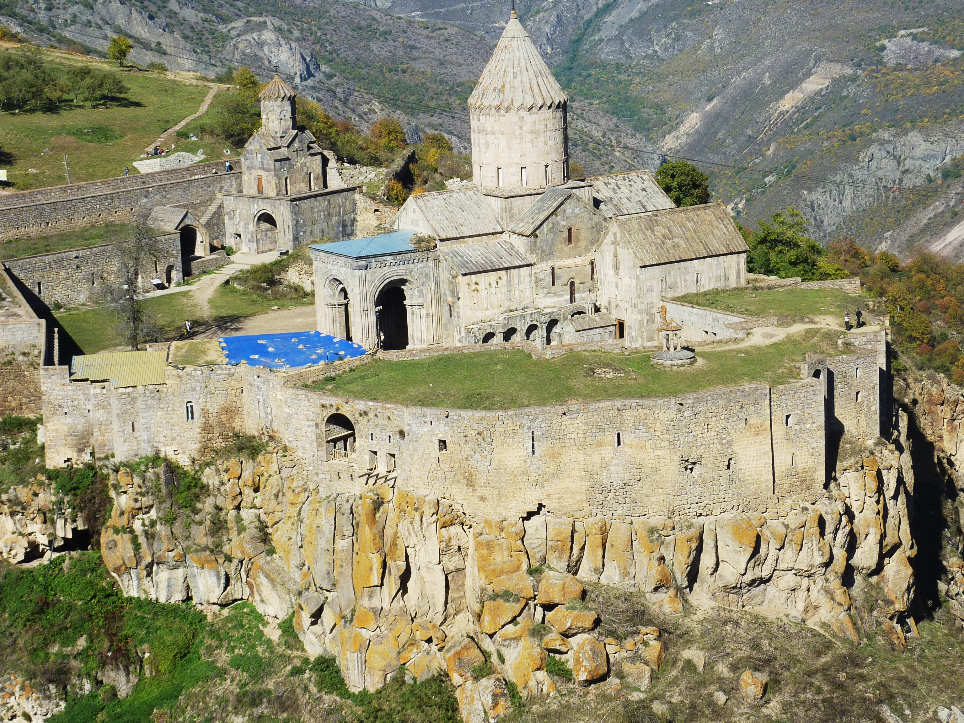 Le monastère de Tatév vu de près